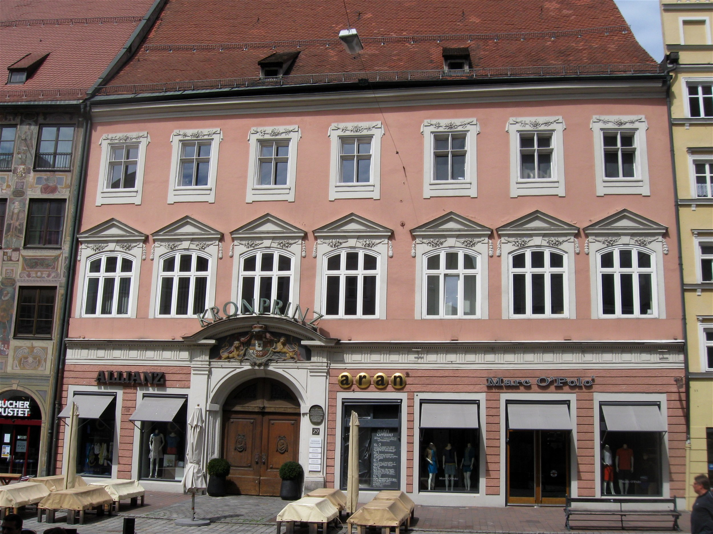 Altstadt 29; Ehemalige herzogliche, dann kurfürstliche Kanzlei, später in Erinnerung an den Universitätsaufenthalt Ludwigs I. von Bayern in "Haus zum Kronprinzen" umbenannt, für herzoglichen Kanzler Dr. Martin Mair (gest. 1481) erbaut, stattlicher dreigeschossiger Bau zu sieben Obergeschossachsen, traufständig, Erdgeschosshalle mit Netzrippengewölbe, um 1500, Fassade klassizistisch, um 1784, mit Fassadenschnitt im Erdgeschoß. D-2-61-000-49